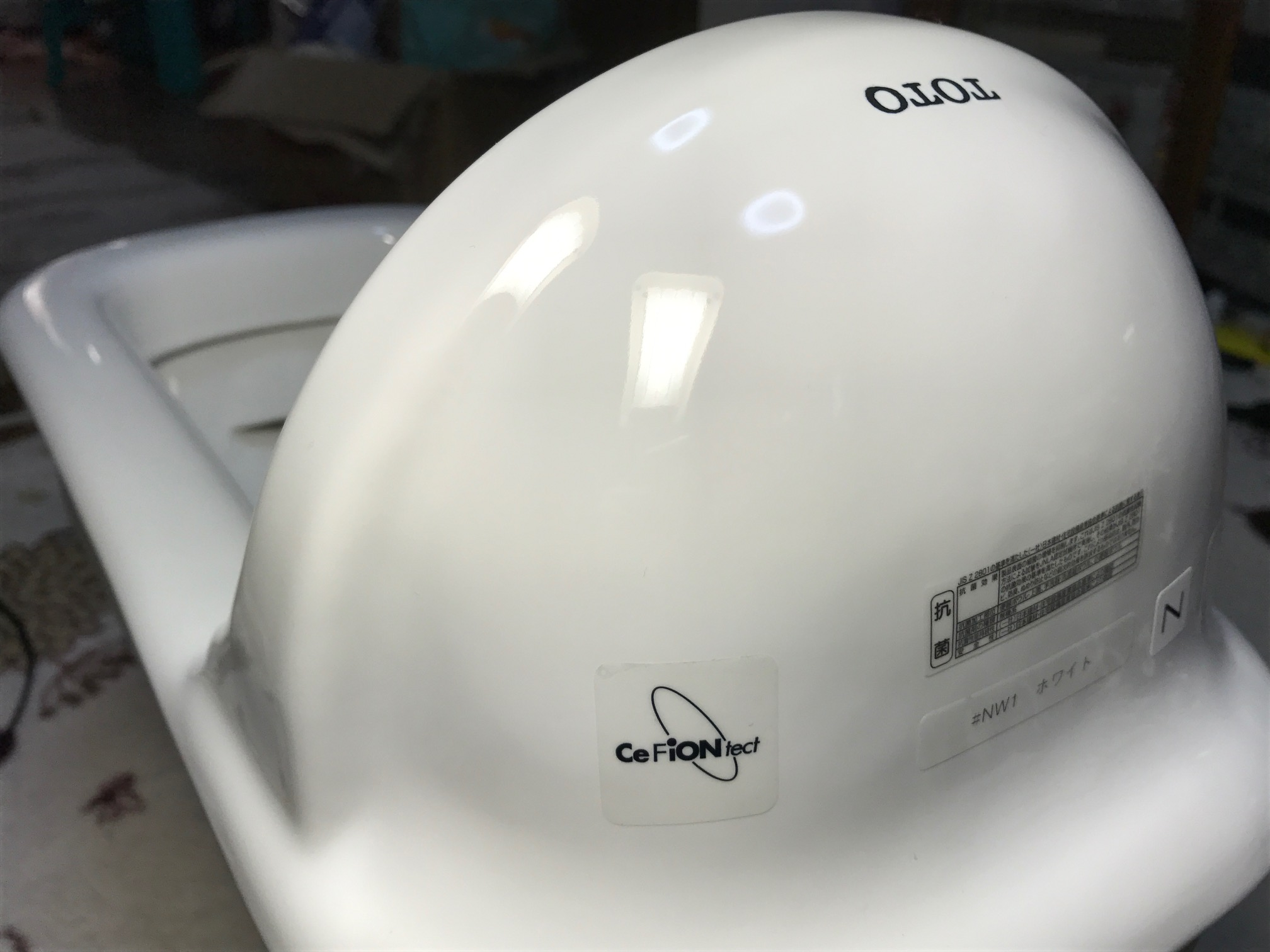 TOTO C75U